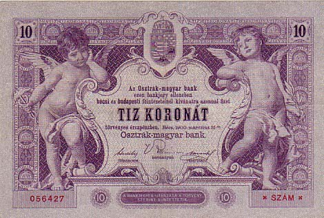 10 Austro-Hungarian Krone/korona (1900) - reverse